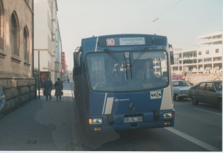 Renault 180. PR der Saartal-Linien AG in der Trierer Straße in Saarbrücken